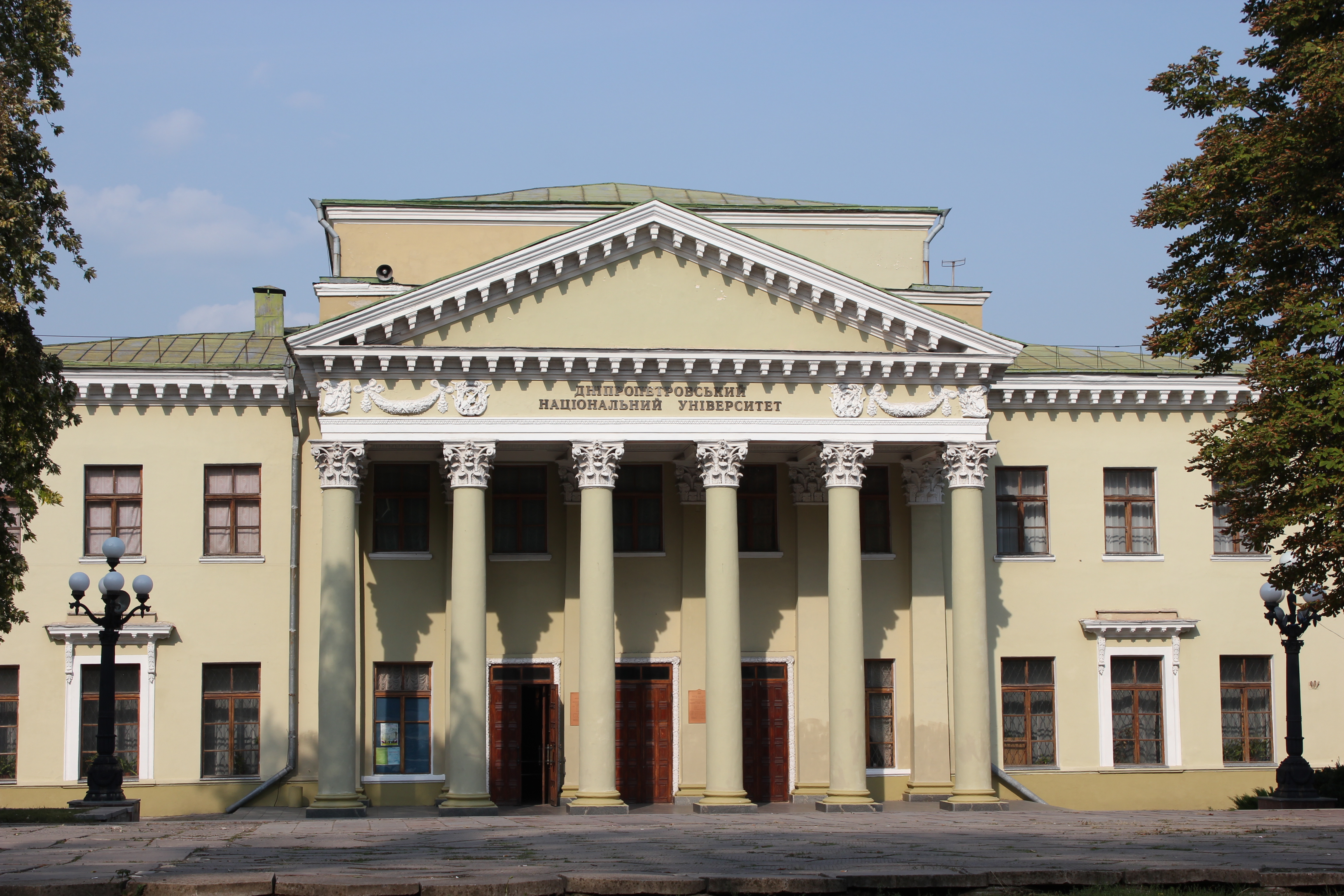 Палац студентів ДНУ ім. О. Гончара